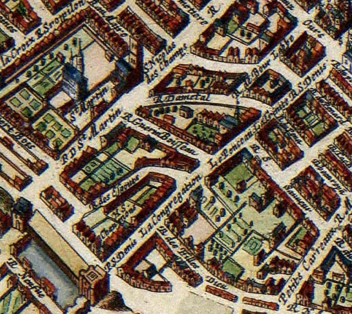 Détail du Plan de Jan Janssonius en 1657. Hôpital et cimetière de la Trinité rue Saint Denis à Paris.